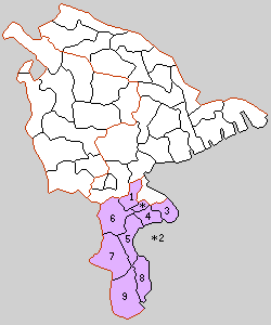 久良岐郡の町村。